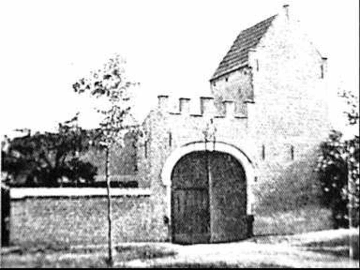 Ter Elst: voorgevel Fig. 80 blz. 98 (opmerking: Deze afbeelding hebben wij helaas alleen in deze lage resolutie.)